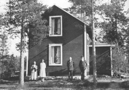 Gräsberg. Detta är den stuga Dan hjälpte sin far att bygga. Fönstret på andra våningen hör till Dans arbetsrum. På bilden syns, från vänster, modern, systern Anna, brodern Simon och fadern Adolf Andersson (1854-1931).